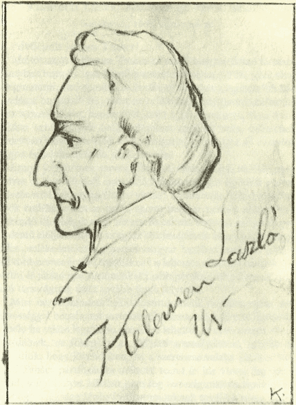 Kelemen László színigazgató.